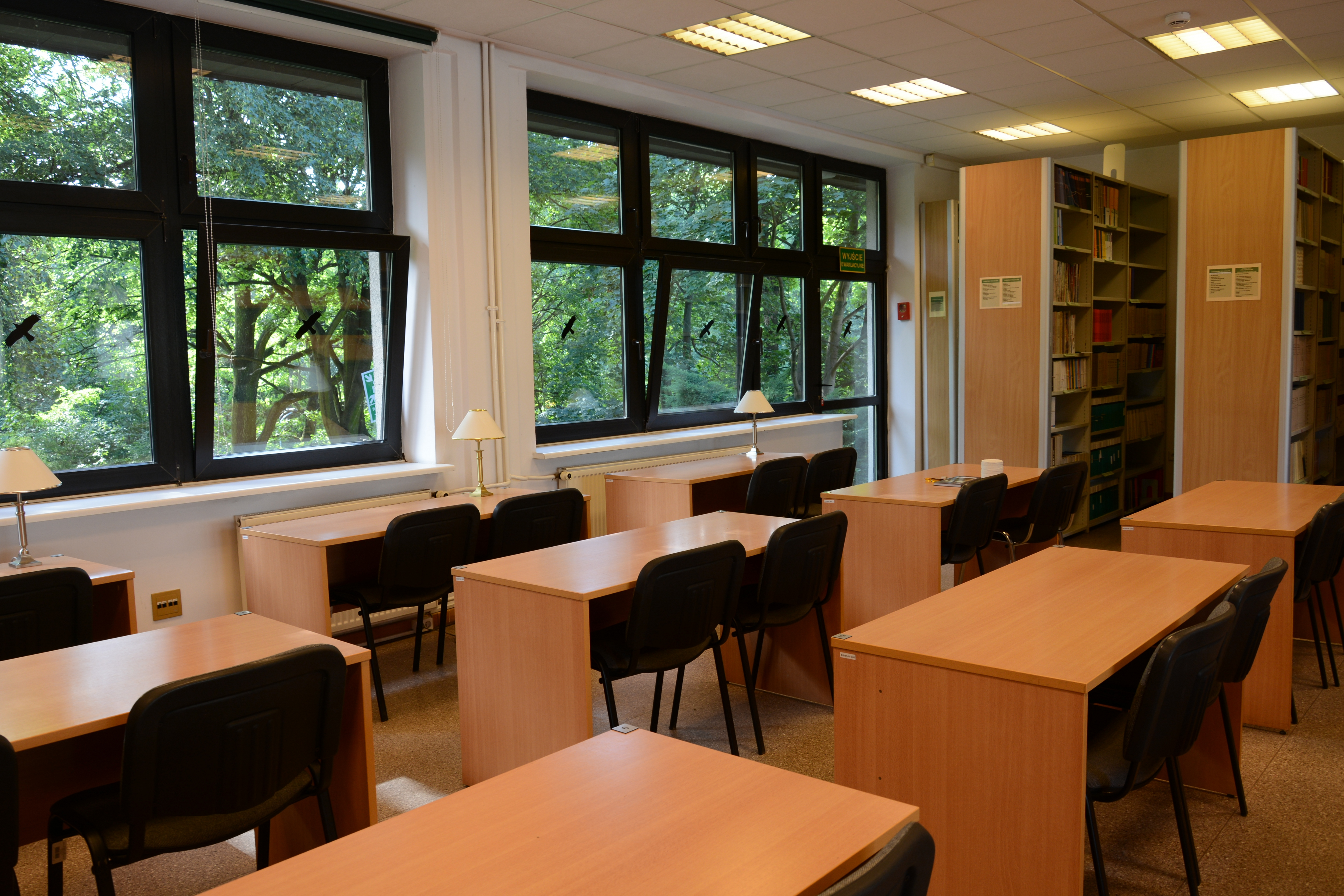 Czytelnia Główna